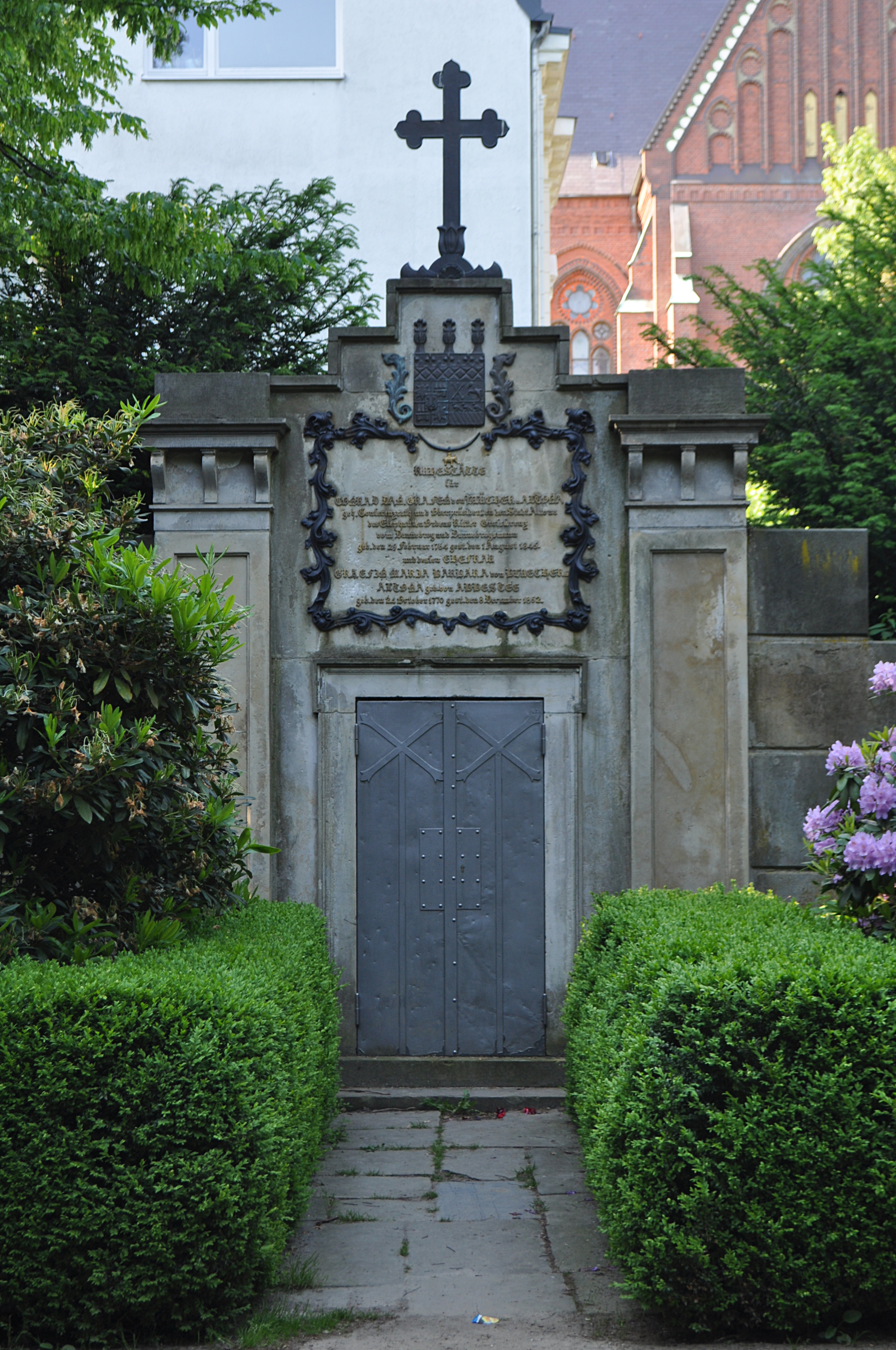 Mausoleum von Blücher auf dem ehemaligen Friedhof Norderreihe in Hamburg-Altona-Altstadt. This is a photograph of an architectural monument.